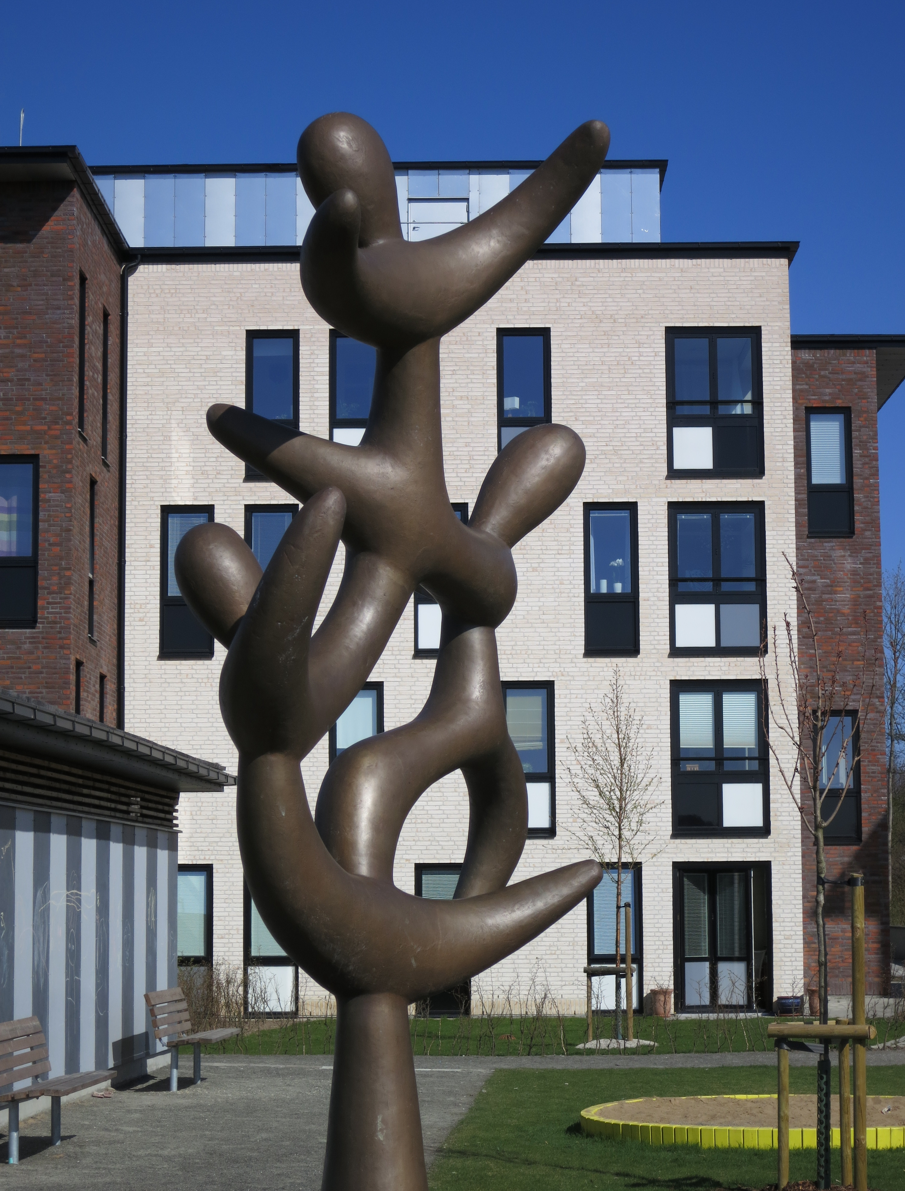 Husie Spira av Per-Erik Willö i kvarteret Draken, Malmö